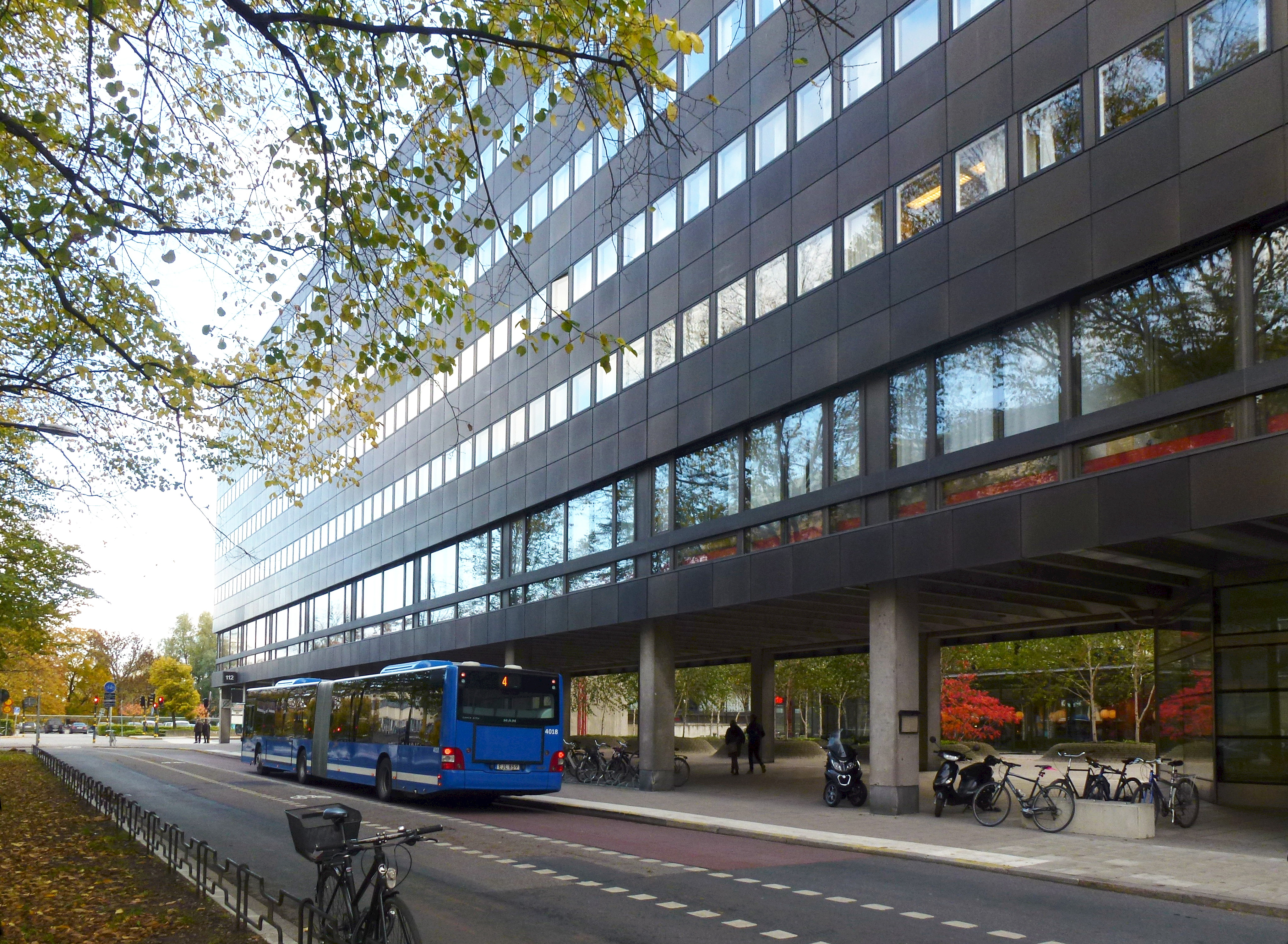 Garnisonen Karlavägen, vy mot nordväst